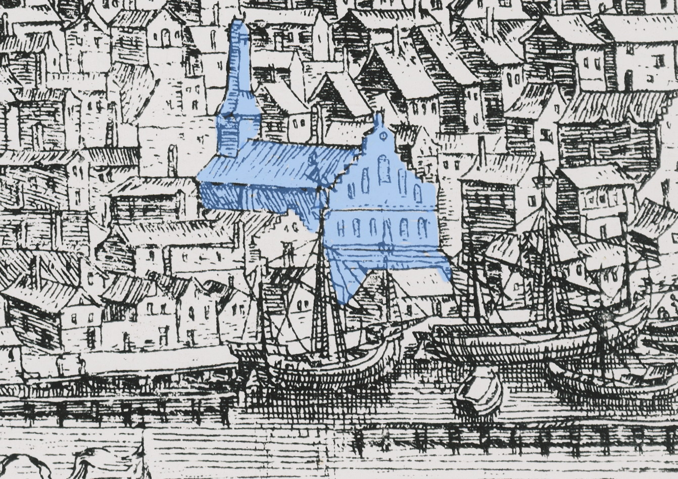 Frans Hogenbergs Stockholmsvy från sydost med nuvarande Kvarteret Pluto visande Stockholms våghus (blått)